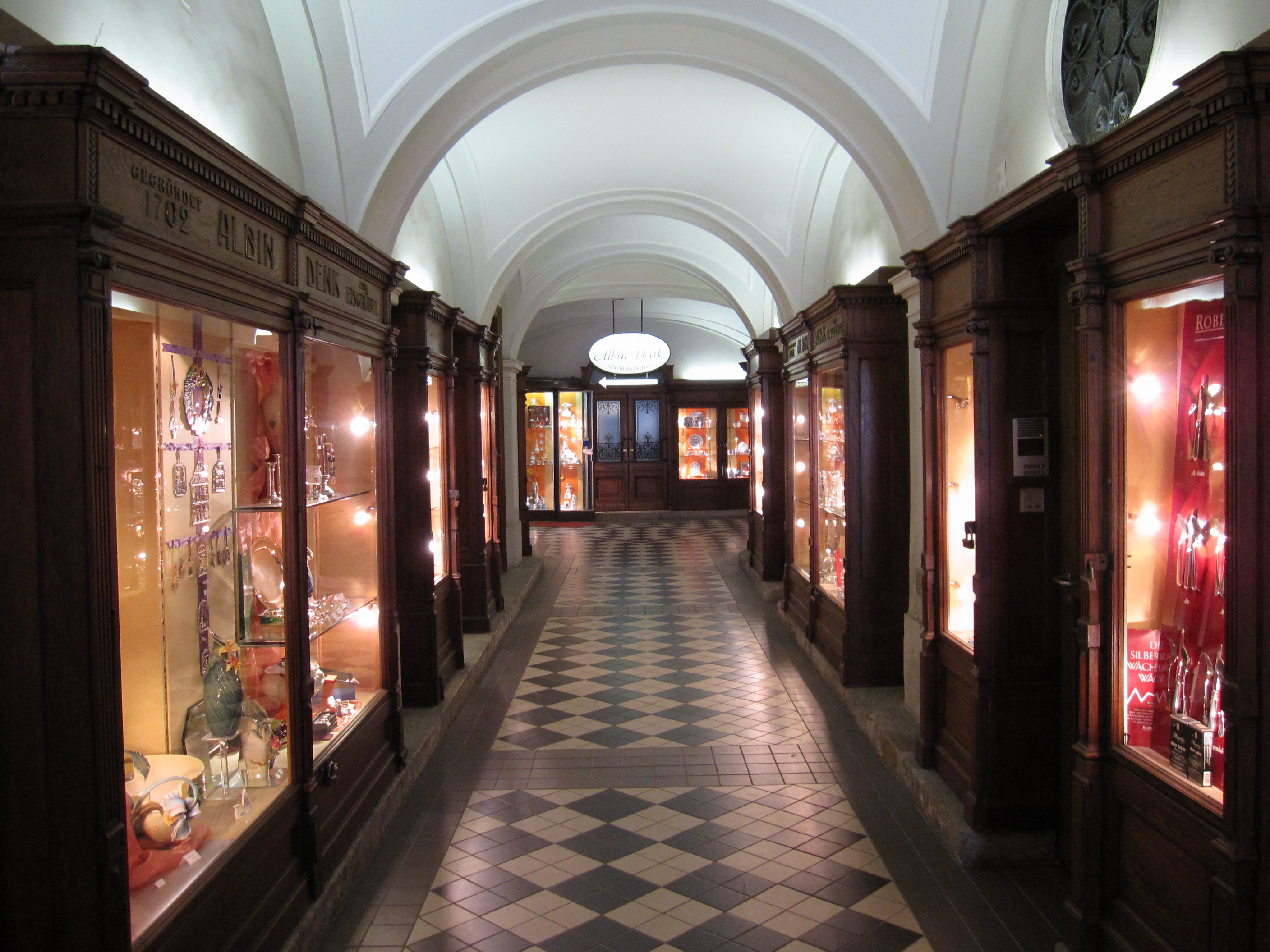 Albin Denk store in Vienna's I. district